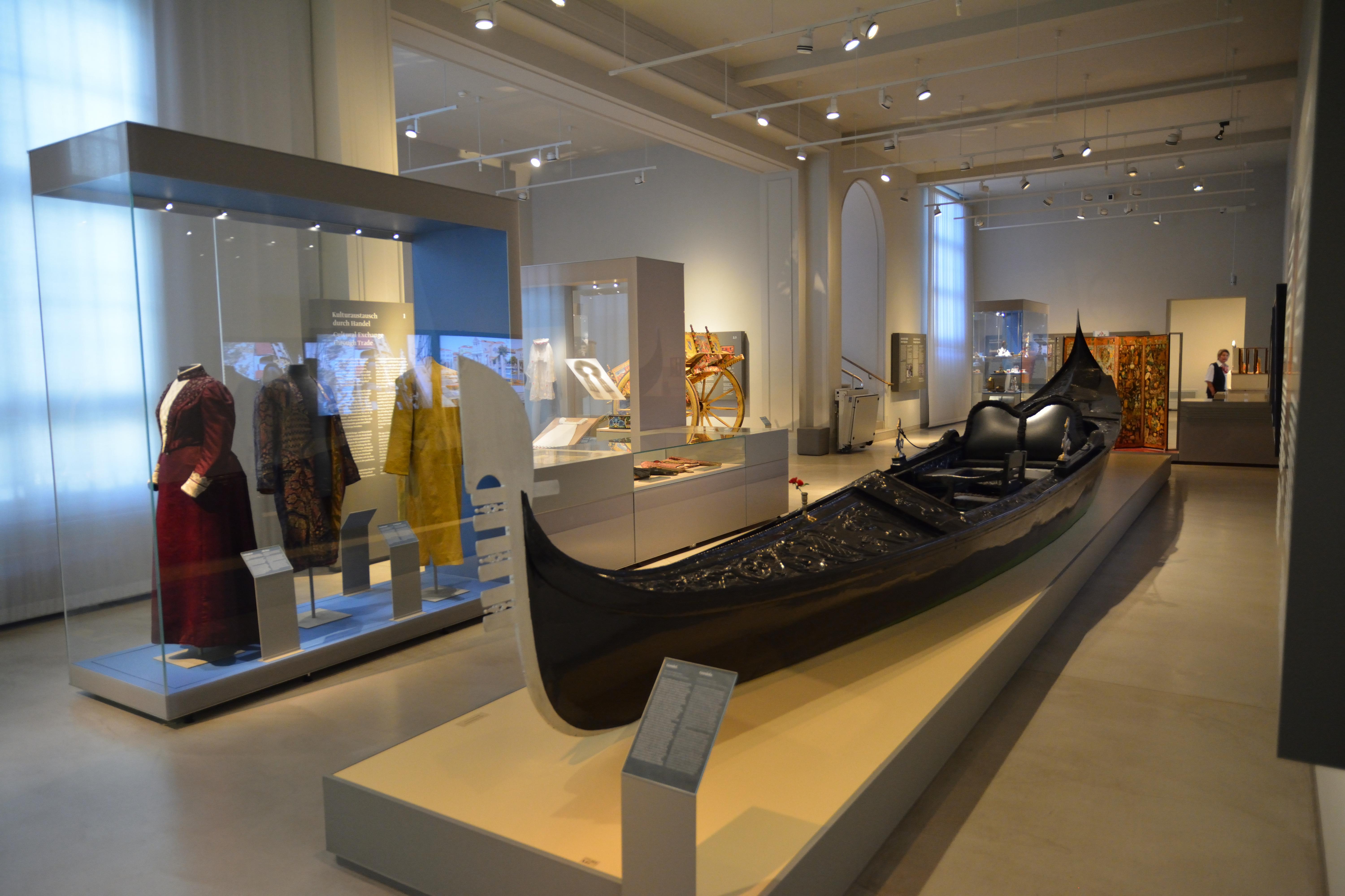 Impressionen aus dem Museum Europäischer Kulturen in BerlinHier: Blick in die Dauerausstellung